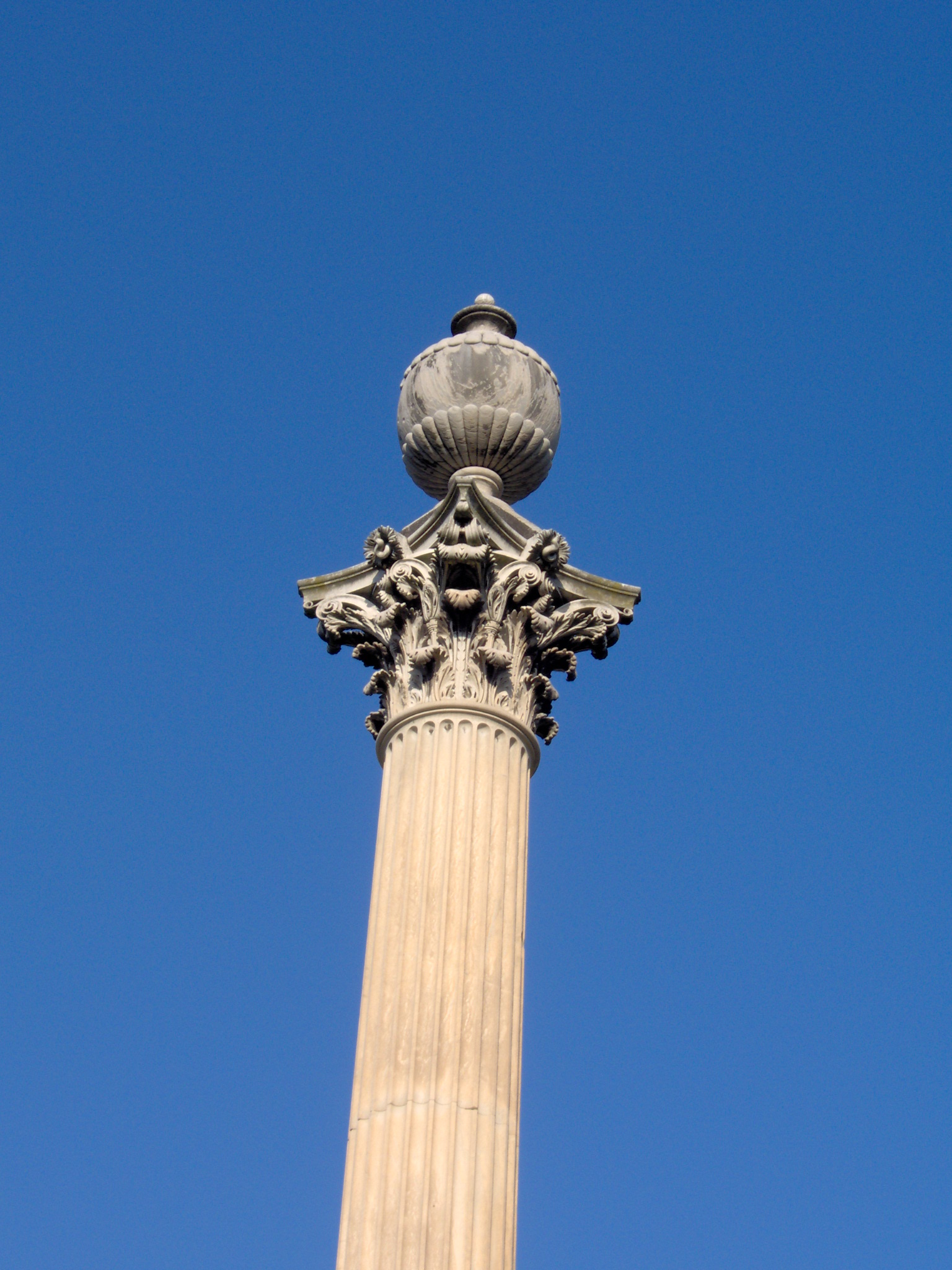 Colonna onoraria di fronte al teatro a Villa Torlonia a Roma.